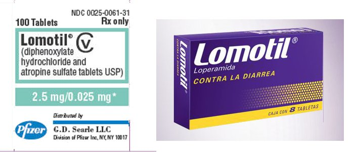 Nombre genérico del Lomotil antes y después del cambio